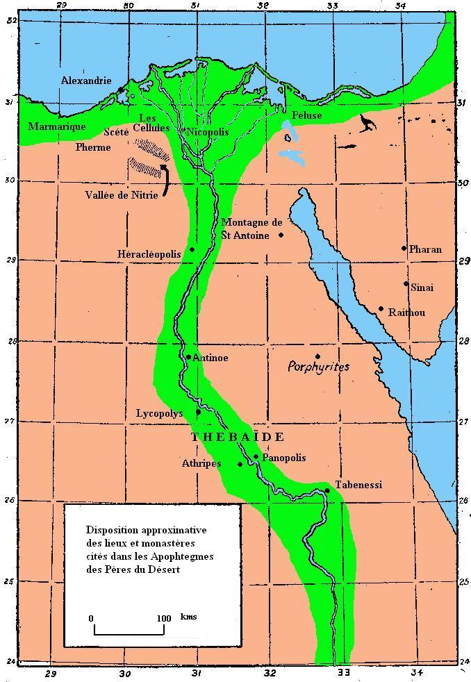 carte des monasteres d'Egypte